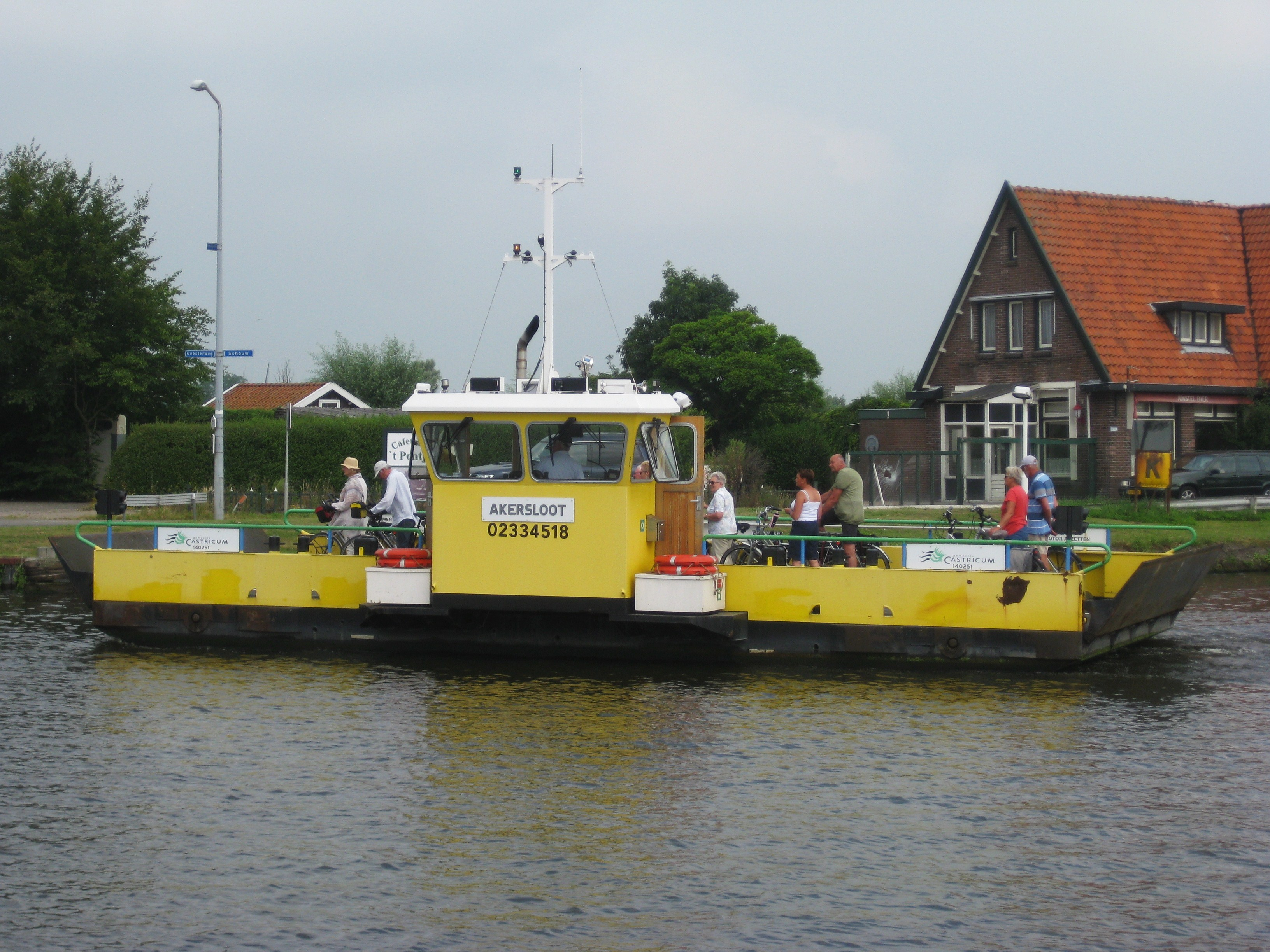 Veerpont over het Noordhollandsch Kanaal bij Akersloot vaart vanaf 4 juni 2010, na 132 jaar oude kabelpont.